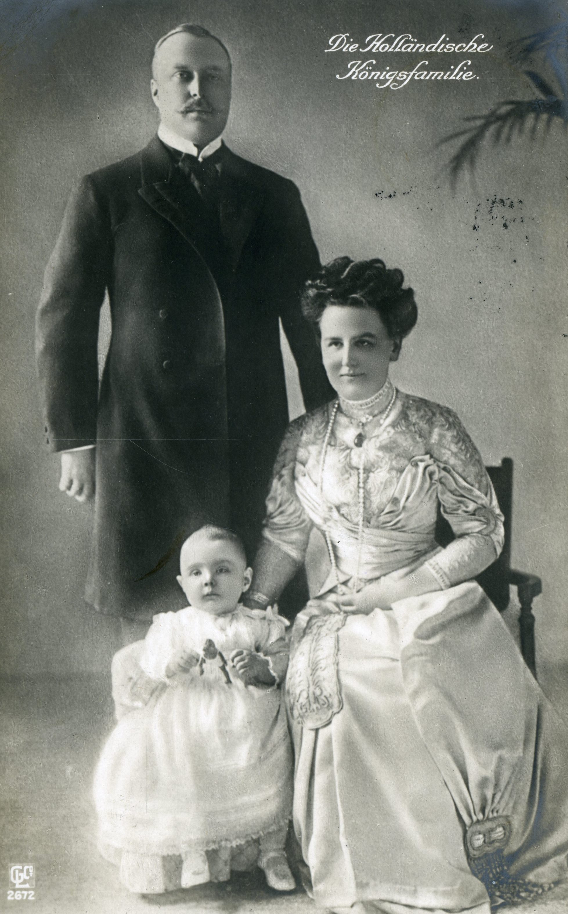 Die niederländische Königin Wilhelmina von Oranien-Nassau mit Ehemann Heinrich zu Mecklenburg und Tochter Juliana (1911)